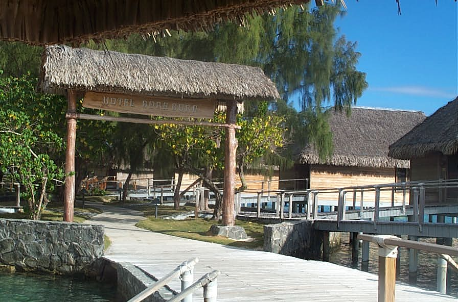 Entrada Hotel Bora Bora